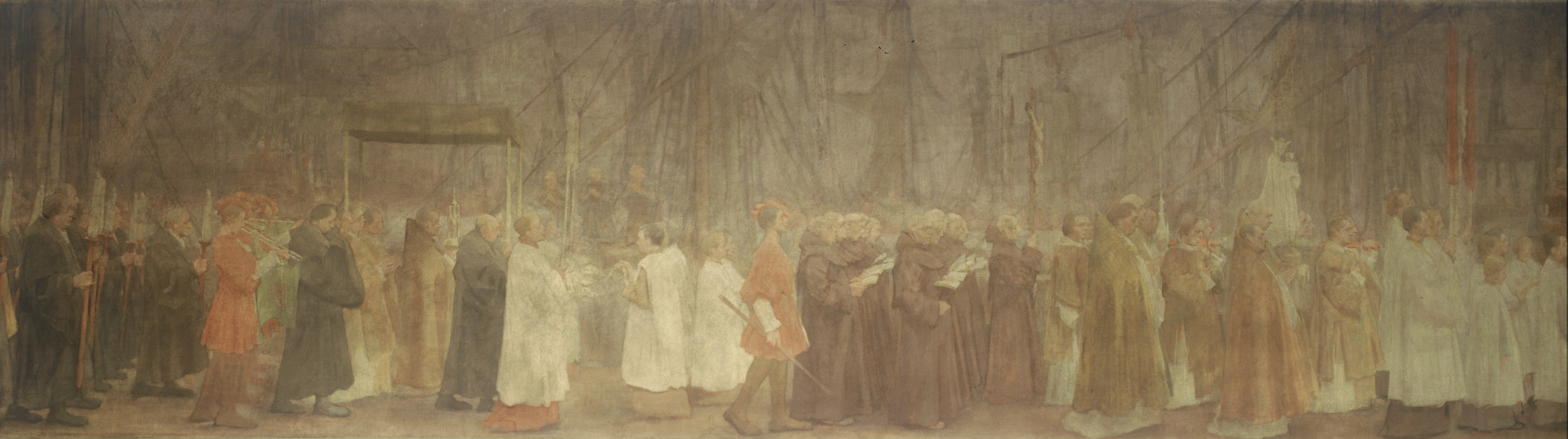 Processie van het H. Sacrament van Mirakel, geschilderd door Antoon Derkinderen voor de Amsterdamse Begijnhofkapel (1889)